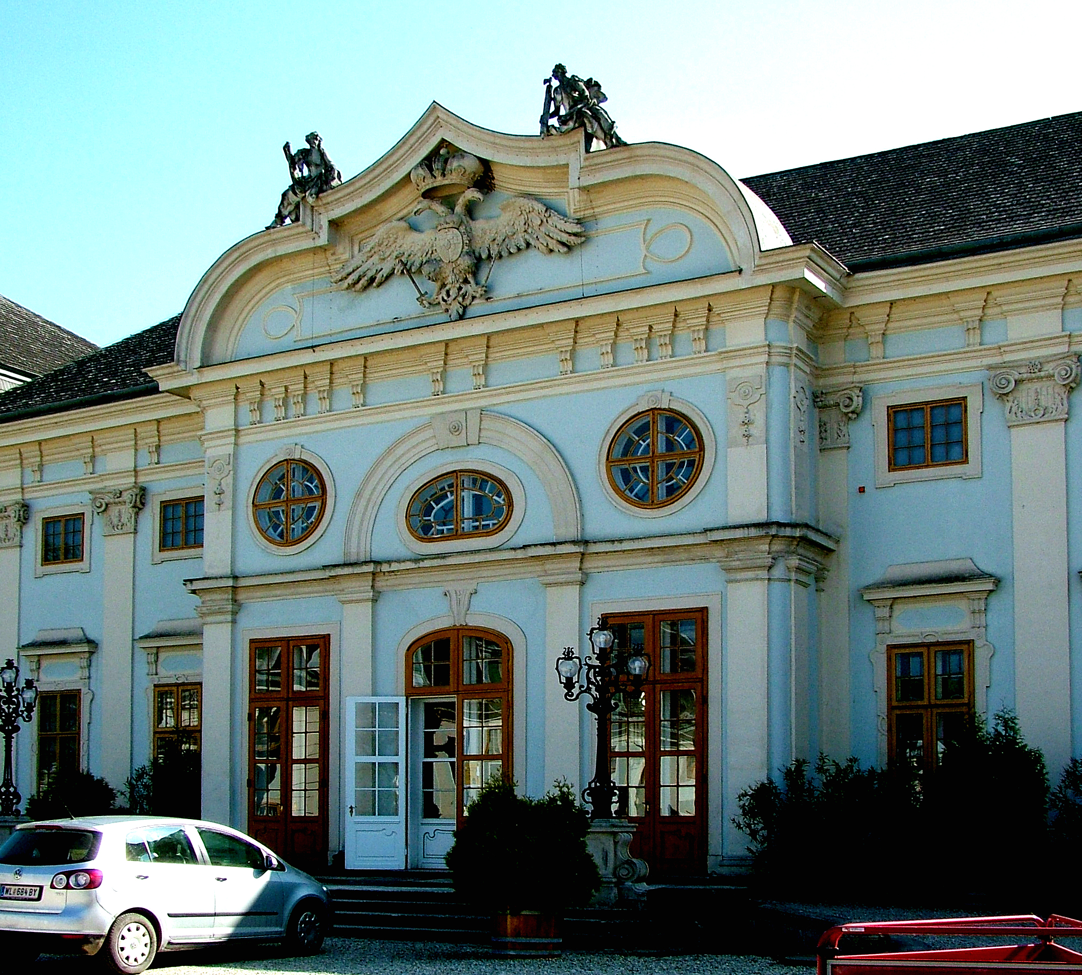 Halbturni kastély: az udvari homkokzat középaxisa (Ausztria)